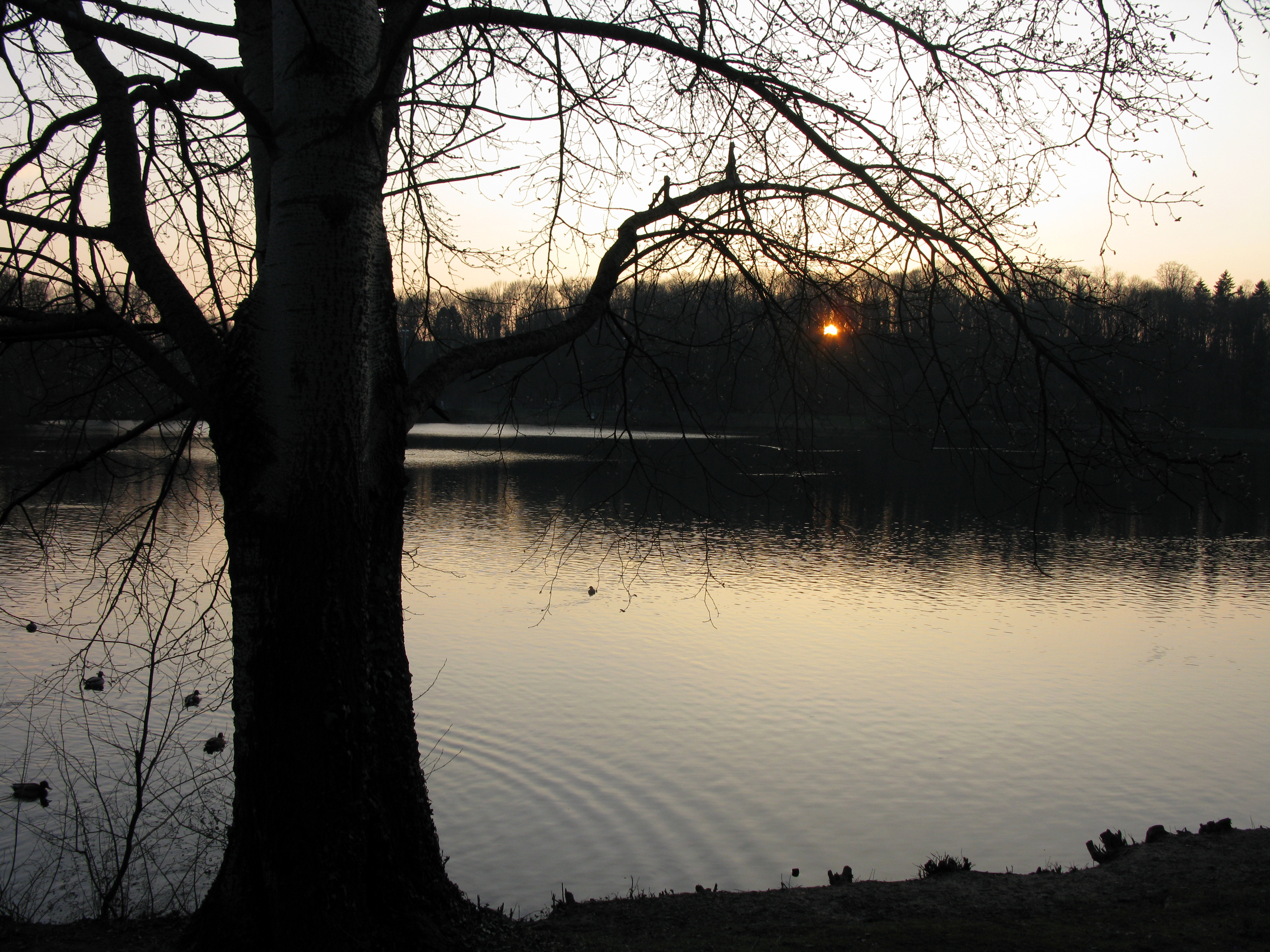 Moosweiher in Freiburg-Landwasser